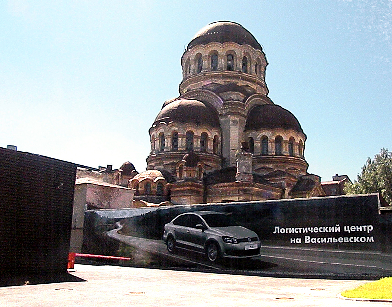 Санкт-Петербург. В.О. №100.Бывшая церковь.